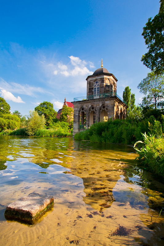 Gotische Bibliothek